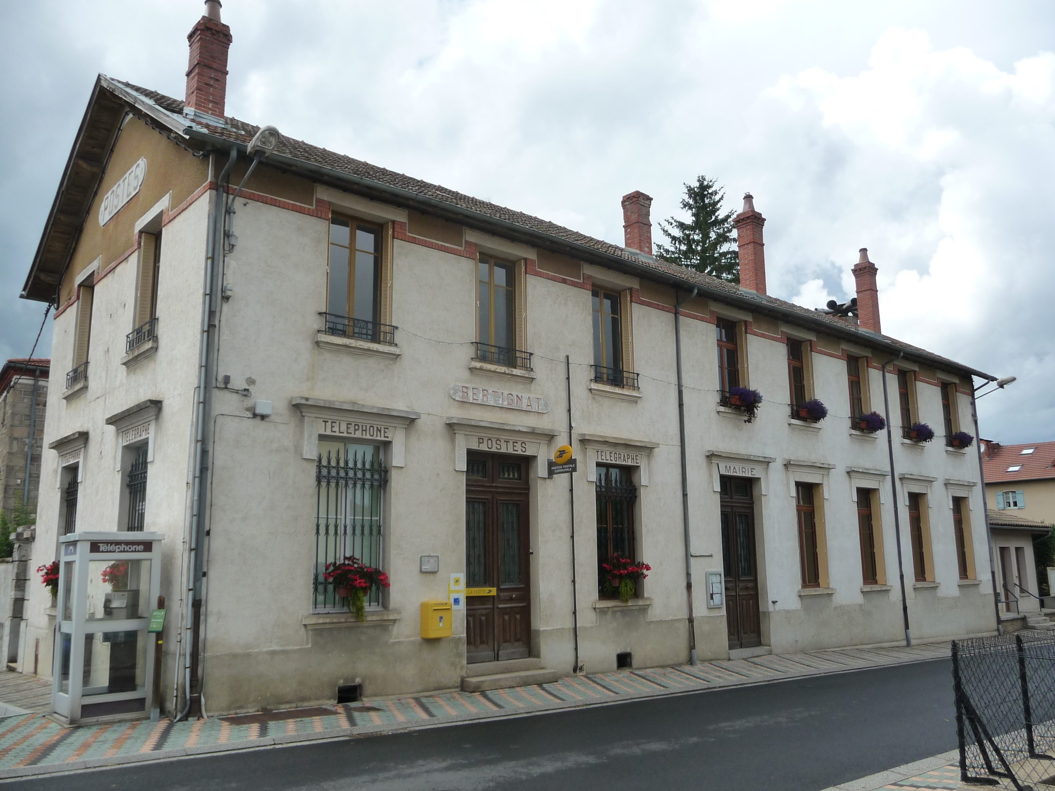 Mairie de Bertignat.